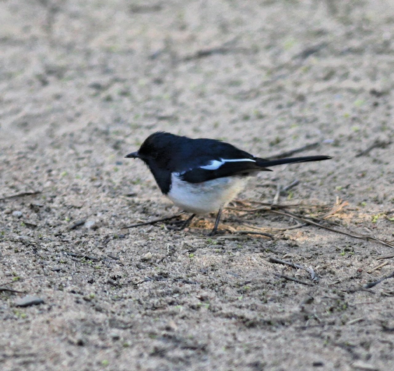 Madagascar Magpie-robin Copsychus albospecularis, male; Kirindy, Madagascar.